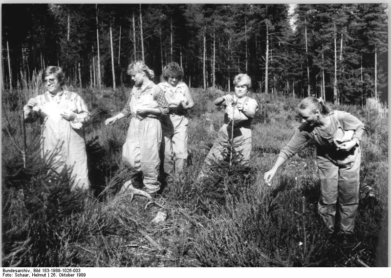 Oberförsterei, Wattieren einer Baumschonung ADN-ZB Schaar 26.10.1989 Bez. Suhl: Forstbrigade- 900 Hektar Wald der thüringischen Oberförsterei Wasungen sind diesen jungen Frauen um Heidi Zehner (M.) zu Schutz und Pflege anvertraut. Das Wattieren junger Fichten gegen Wildverbiß gehört dabei zu den "leichtesten Übungen". Bei den herbstlichen Neubepflanzungen hat jedes Brigademitglied pro Tag beispielsweise 800 Buchen oder 250 junge Fichten in den Boden zu bringen.